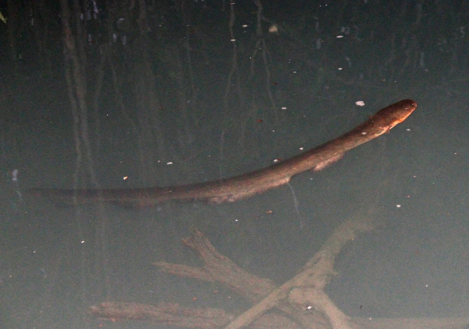 Electrophoridae Electrophorus electricus